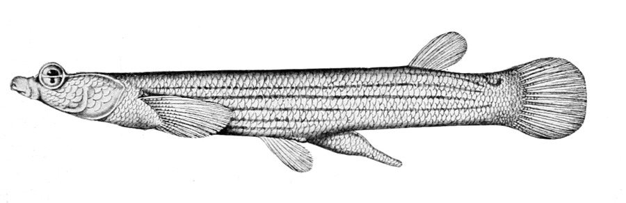 Anableps anableps